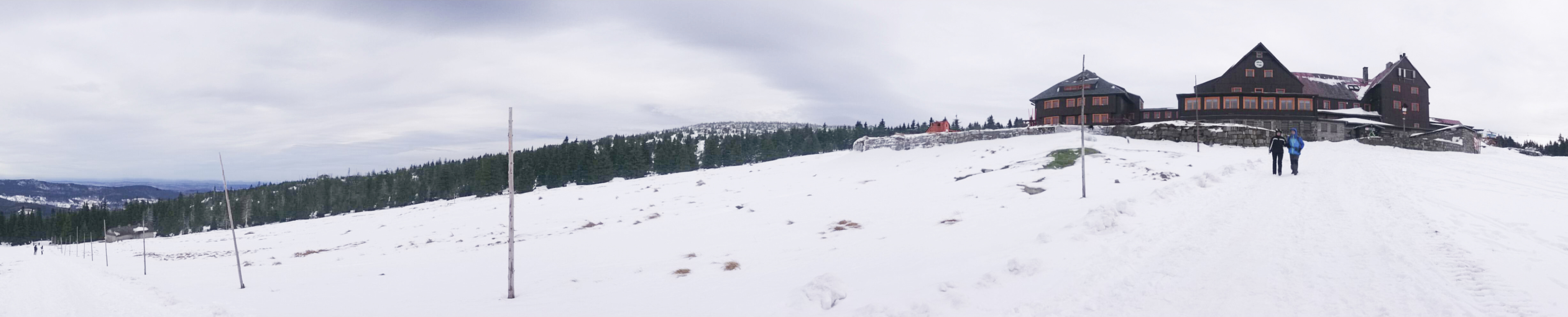 Hala Szrenicka